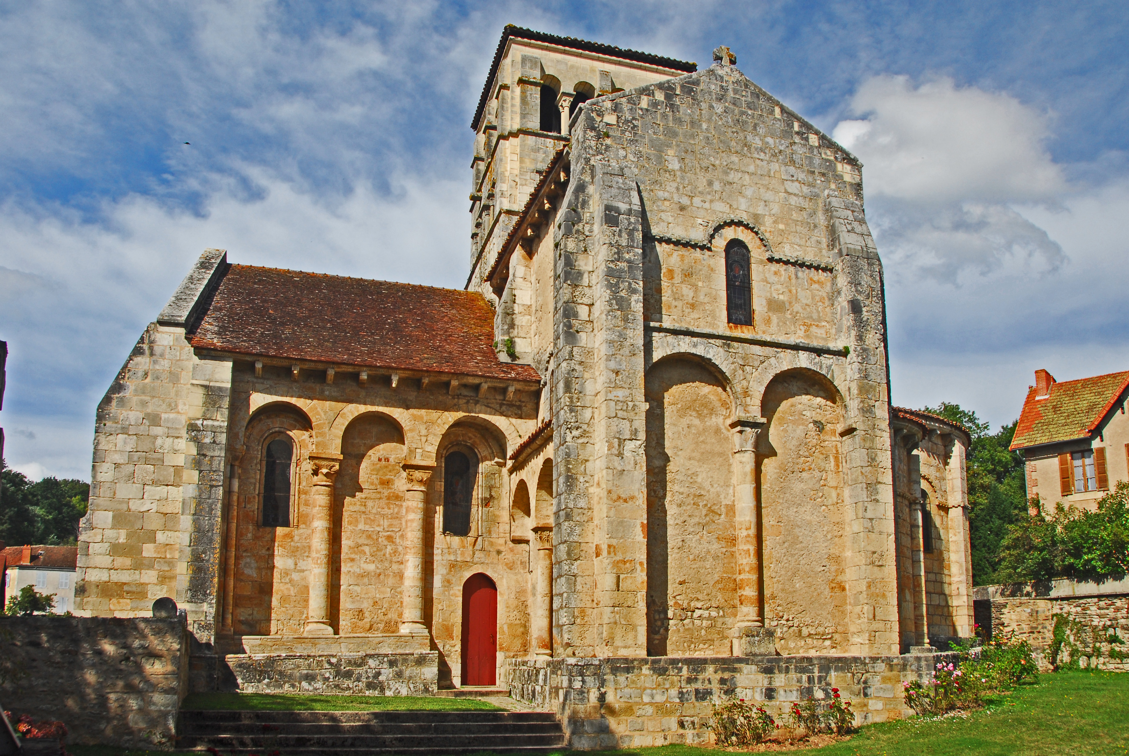 Ste-Croix de Veauce, Lang- und Querhaus von S